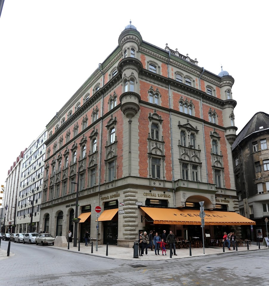 Centrál kávéház, Budapest, Károlyi utca 9